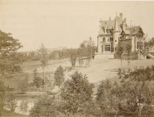 Schloss und Schlosspark Rauischholzhausen um 1870